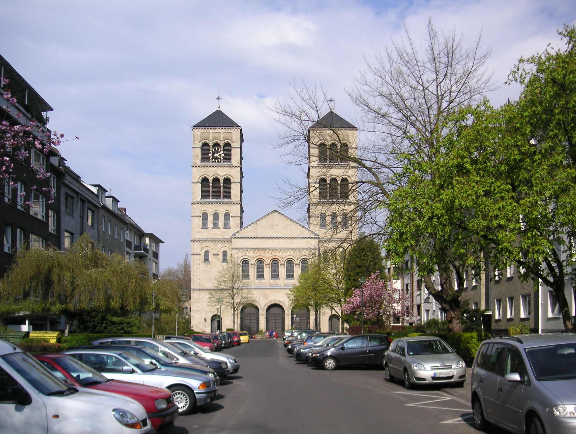 Düsseldorf-Düsseltal, Pauluskirche